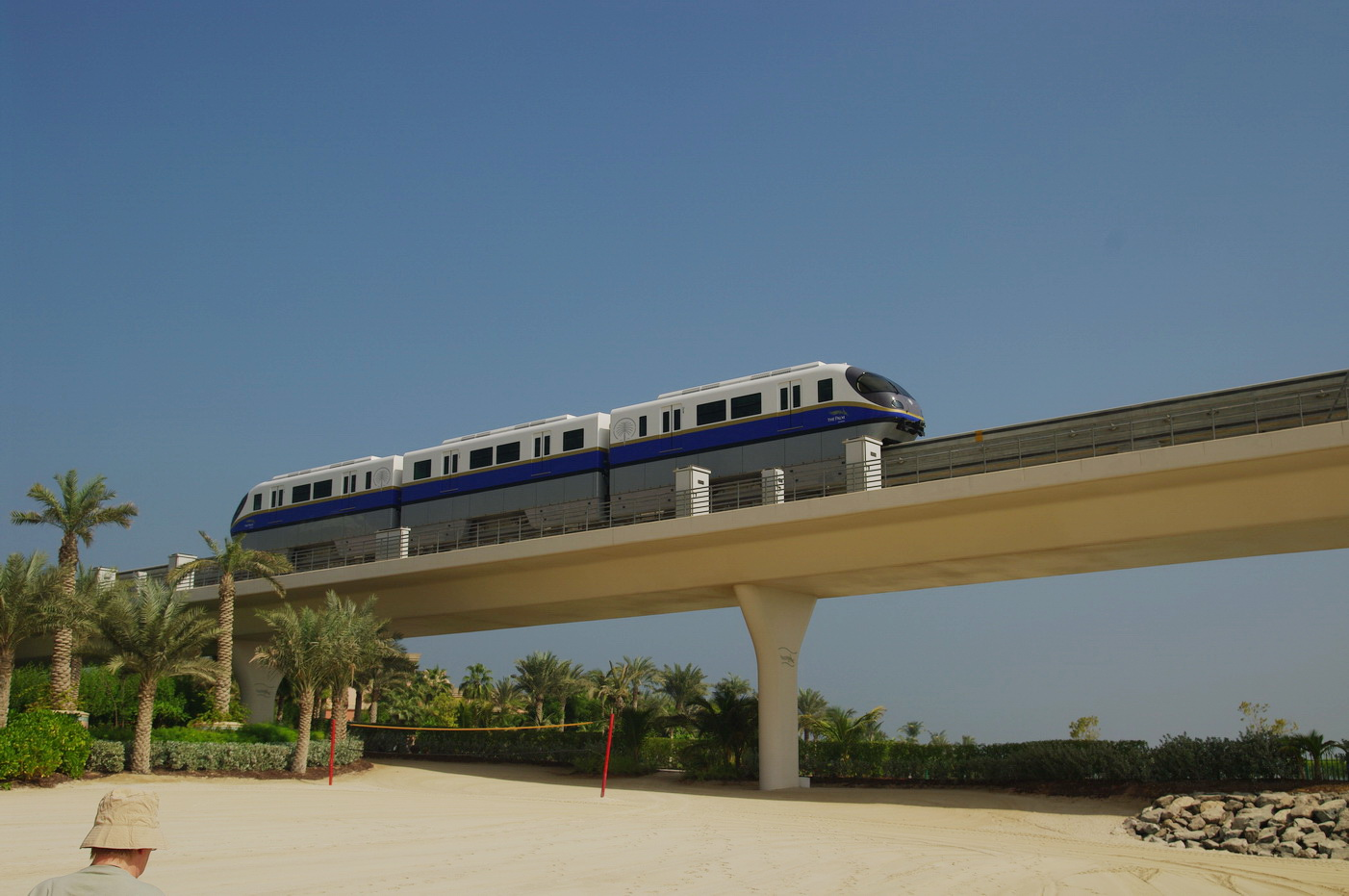 Monorail auf der Jumeira Palm Island, Dubai